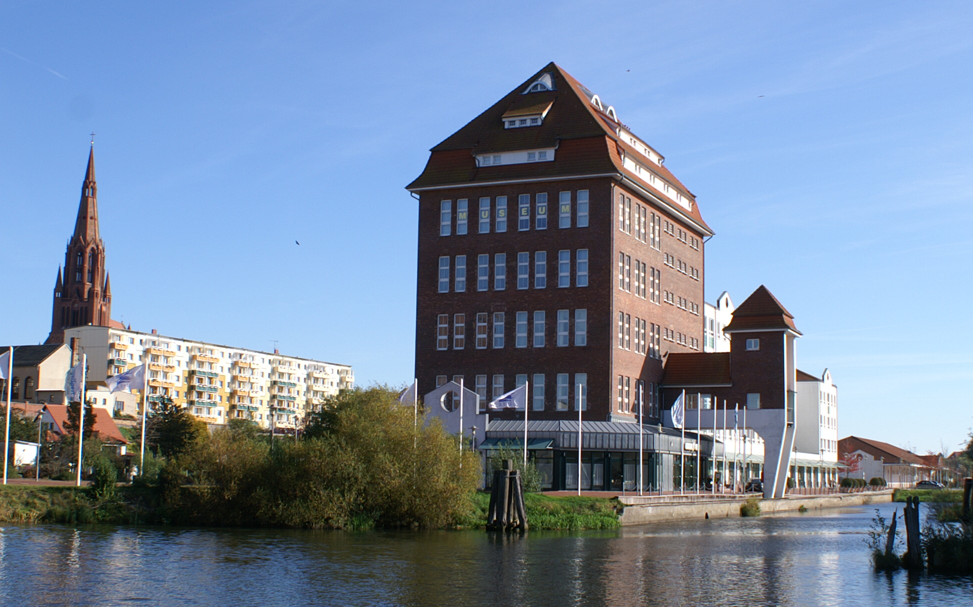 Demmin - Hanseufer mit Speichergebäude